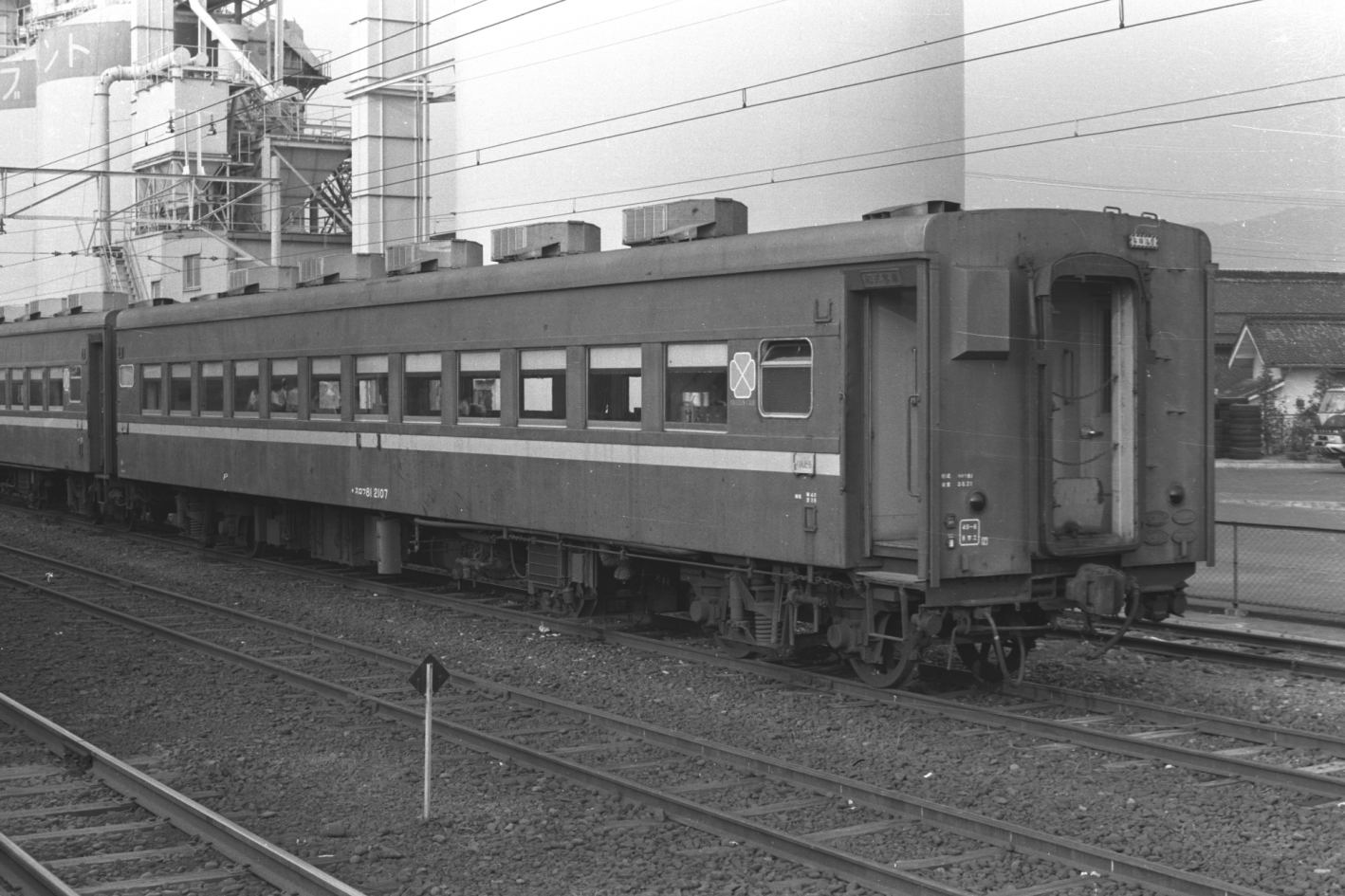 JNR surofu81-2107 at Kawanakajima-Sta., Nagano,JAPAN （国鉄 スロフ81 2107、信越本線川中島駅)